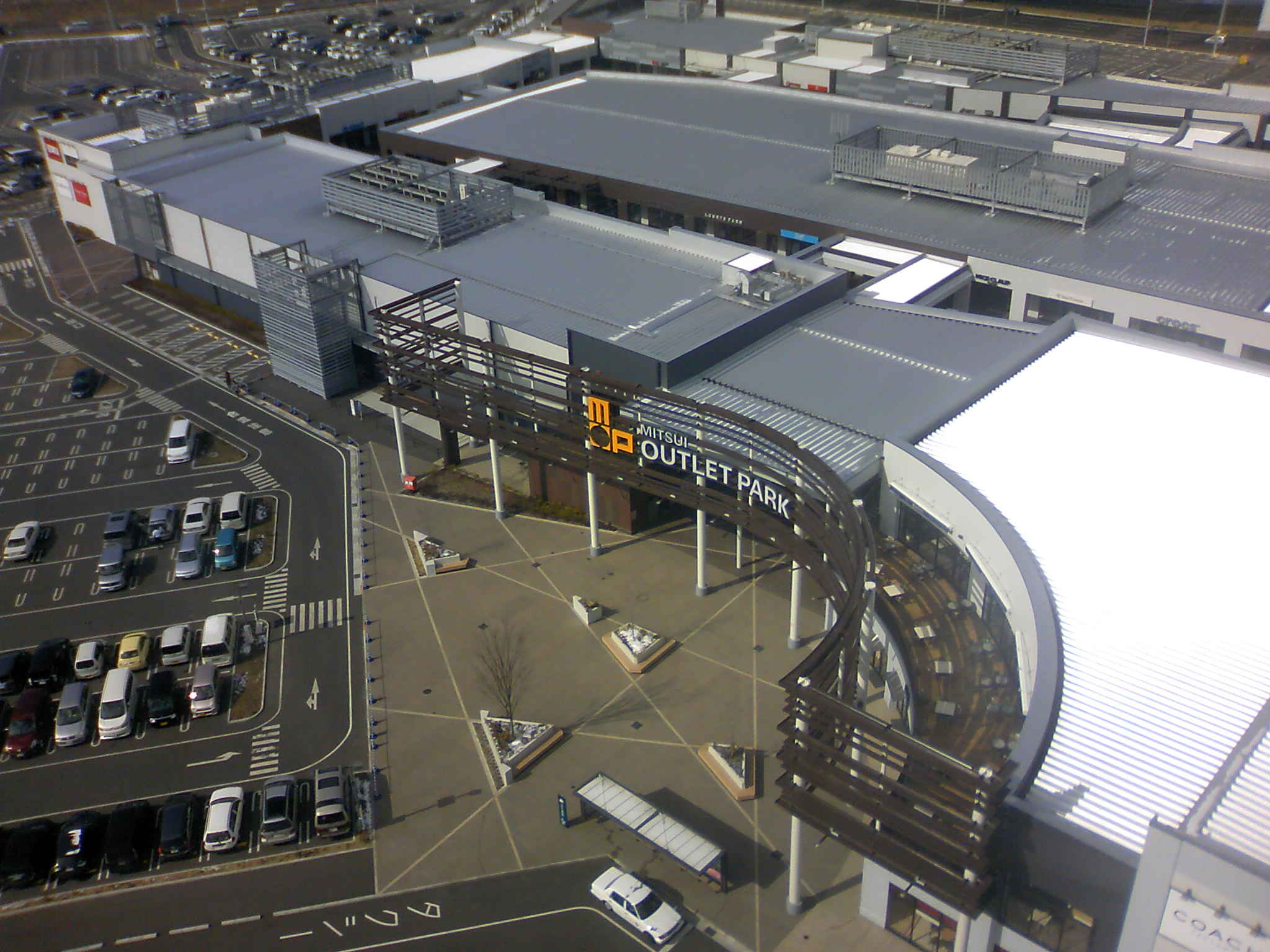 三井アウトレットパーク仙台港を観覧車から撮影したもの